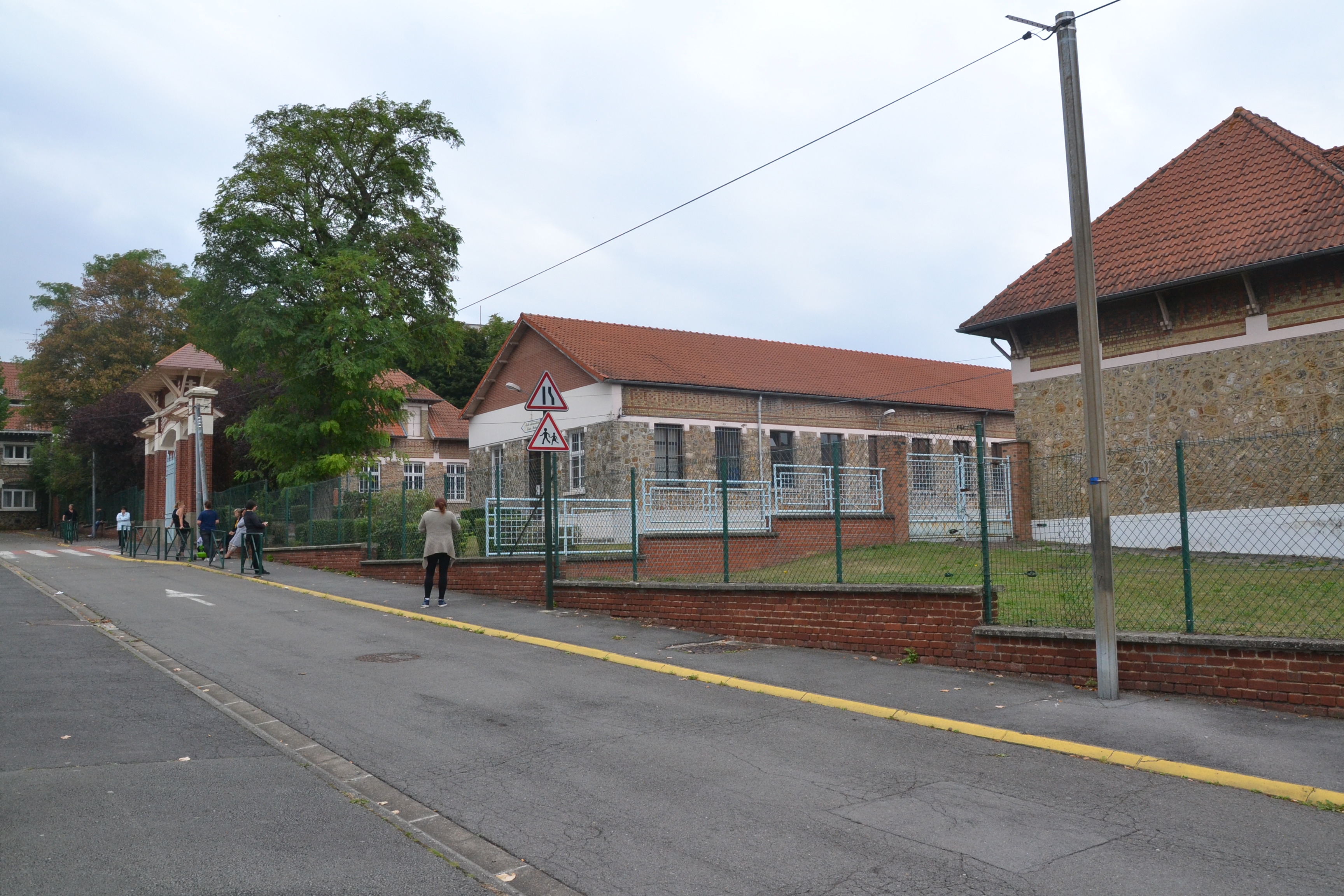 Écoles des cités de la fosse n° 11 - 19 des mines de Lens